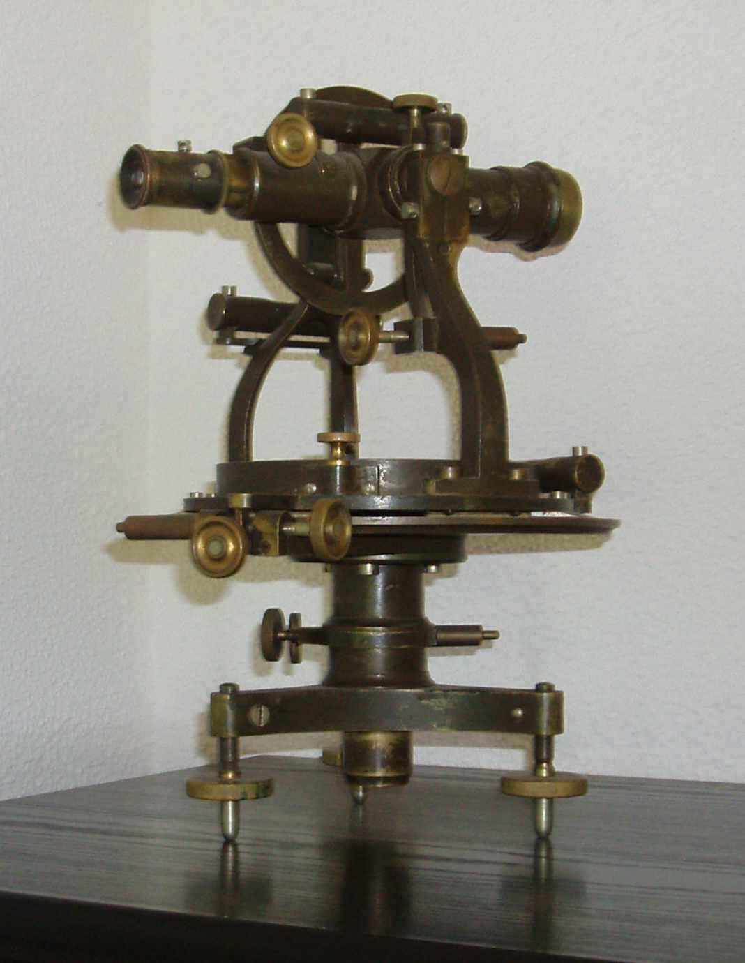 zabytkowy przyrzad geodezyjny, znajdujący się w nadleśnictwie Wichrowo